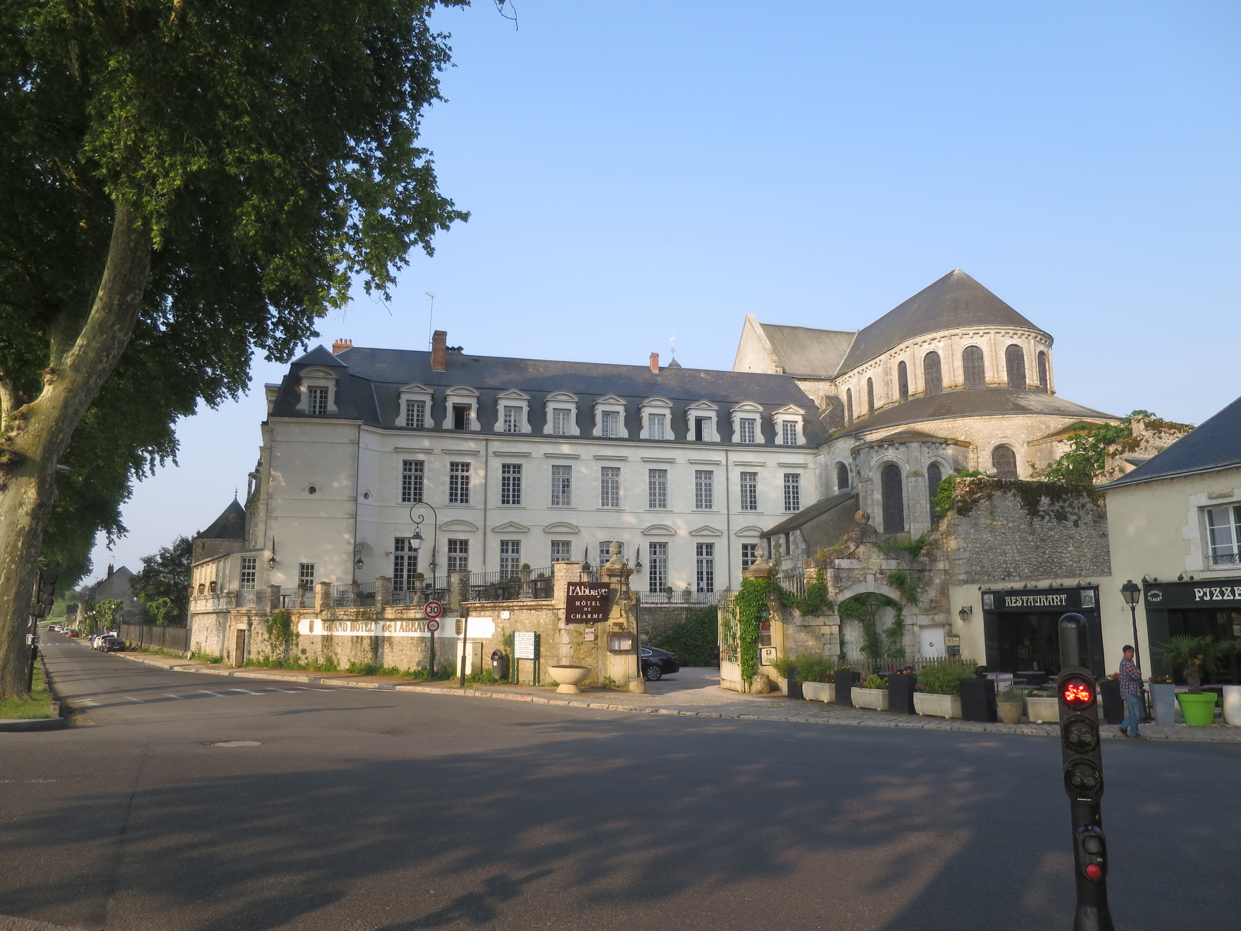 Ehemalige Benediktinerabtei (heute: Hotel) und Kirche Notre-Dame in Beaugency